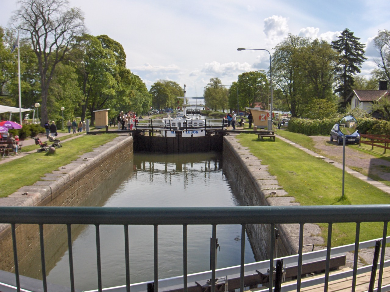 瑞典林雪平市北部贝加（Berg）的约塔运河船闸